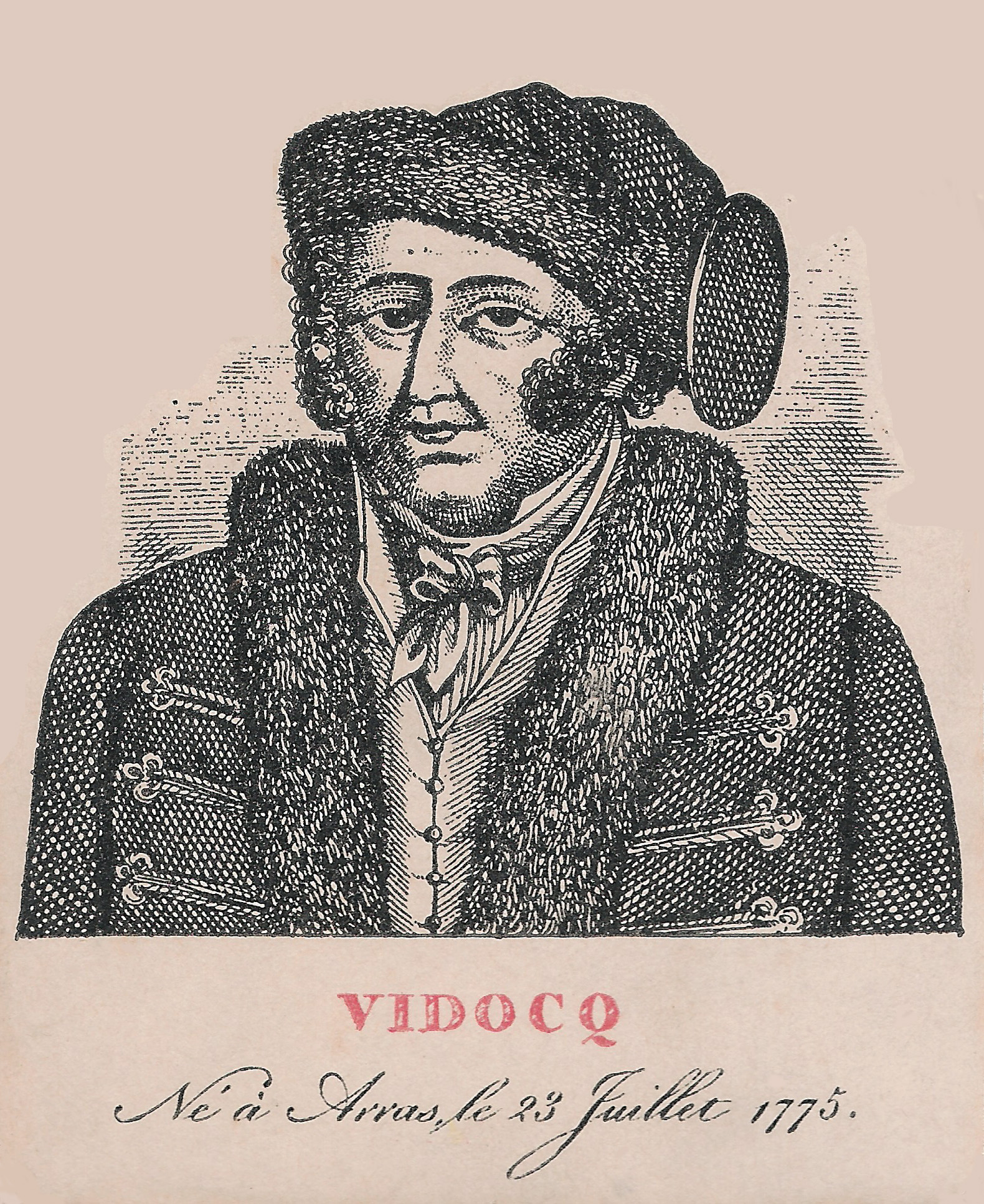 Vidocq né à Arras le 23 juillet 1775, imagerie populaire, XIXe siècle.